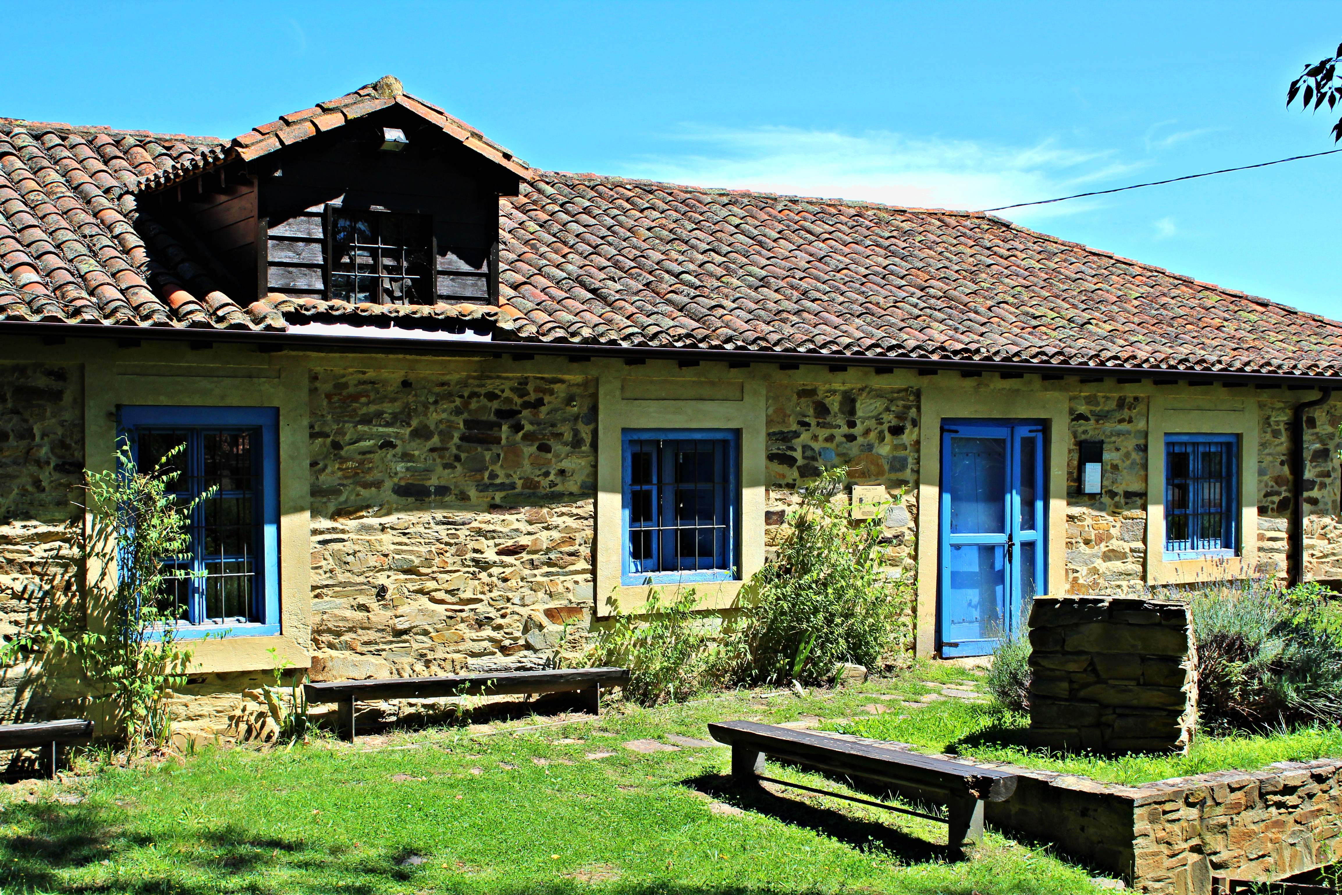 Val de San Lorenzo, la Maragatería, provincia de León.